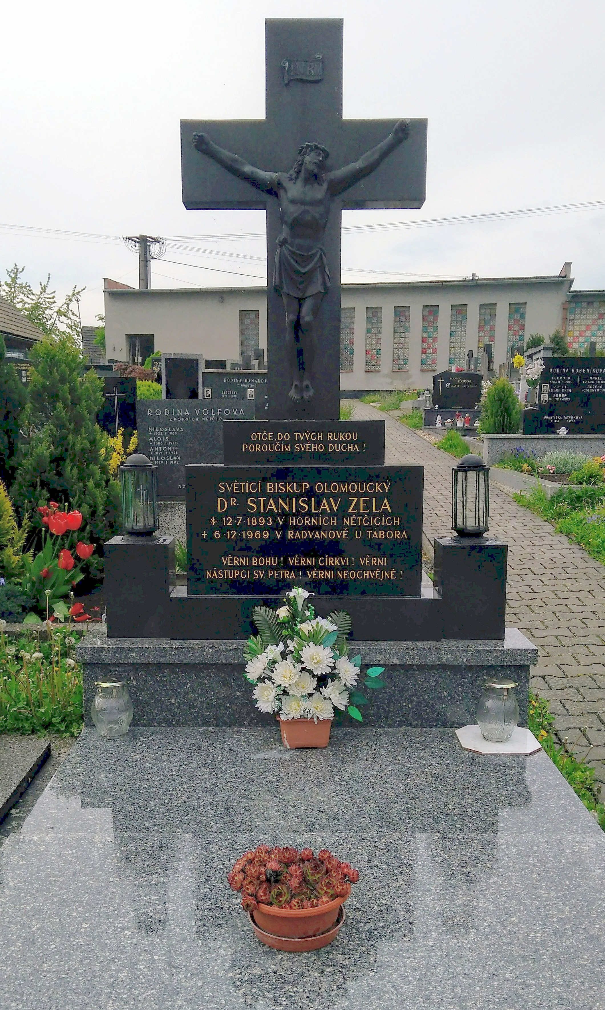 Světící biskup olomoucký Stanislav Zela, Soběchleby - hřbitov